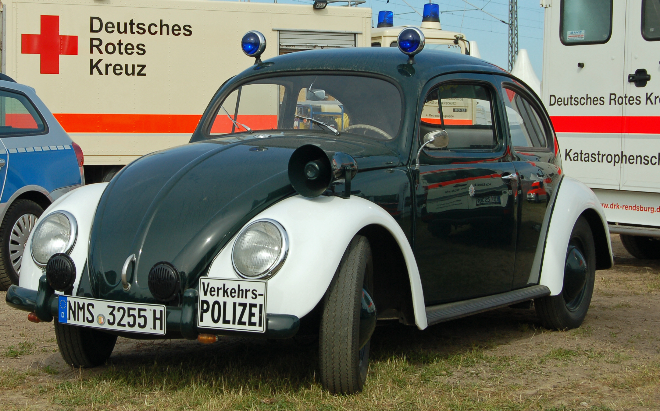 Polizei Smart der Schleswig-Holsteinischen Polizei beim Schleswig-Holstein Tag 2010 in Rendsburg